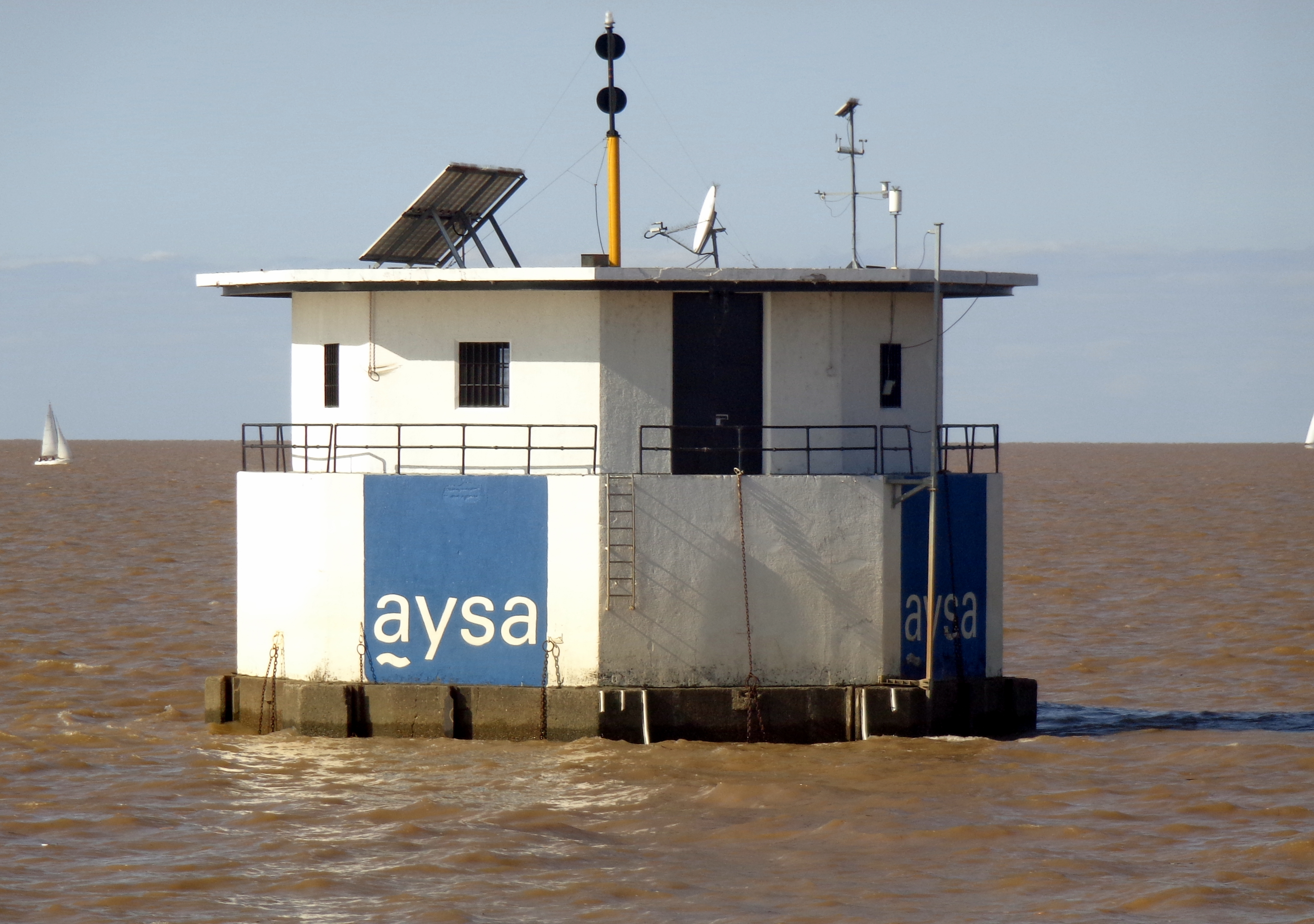 Toma de agua de Aysa para abastecer de agua a la Ciudad de Buenos Aires, Argentina.